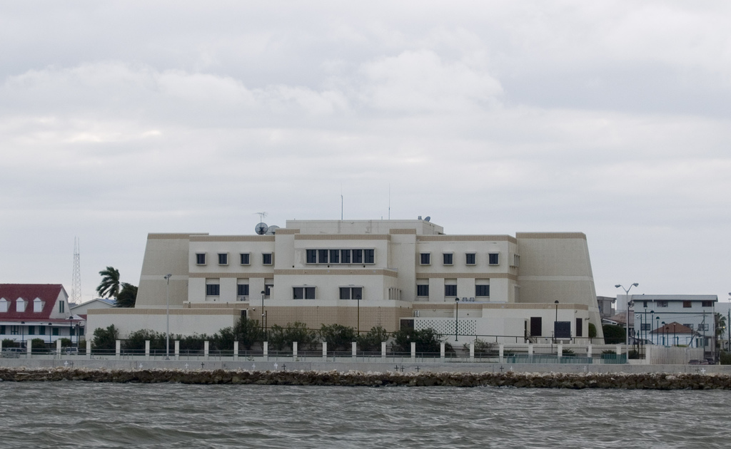 Built like a Maya temple